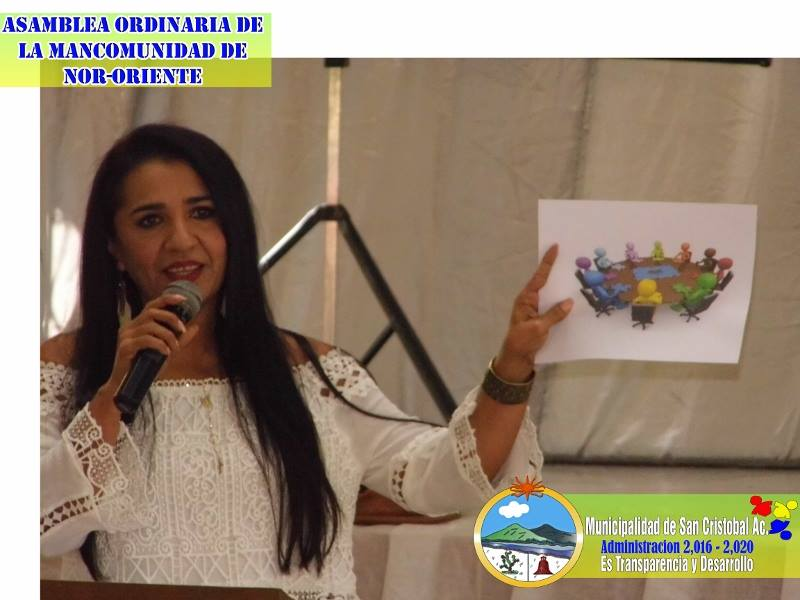 Alcaldesa electa democráticamente por el pueblo.